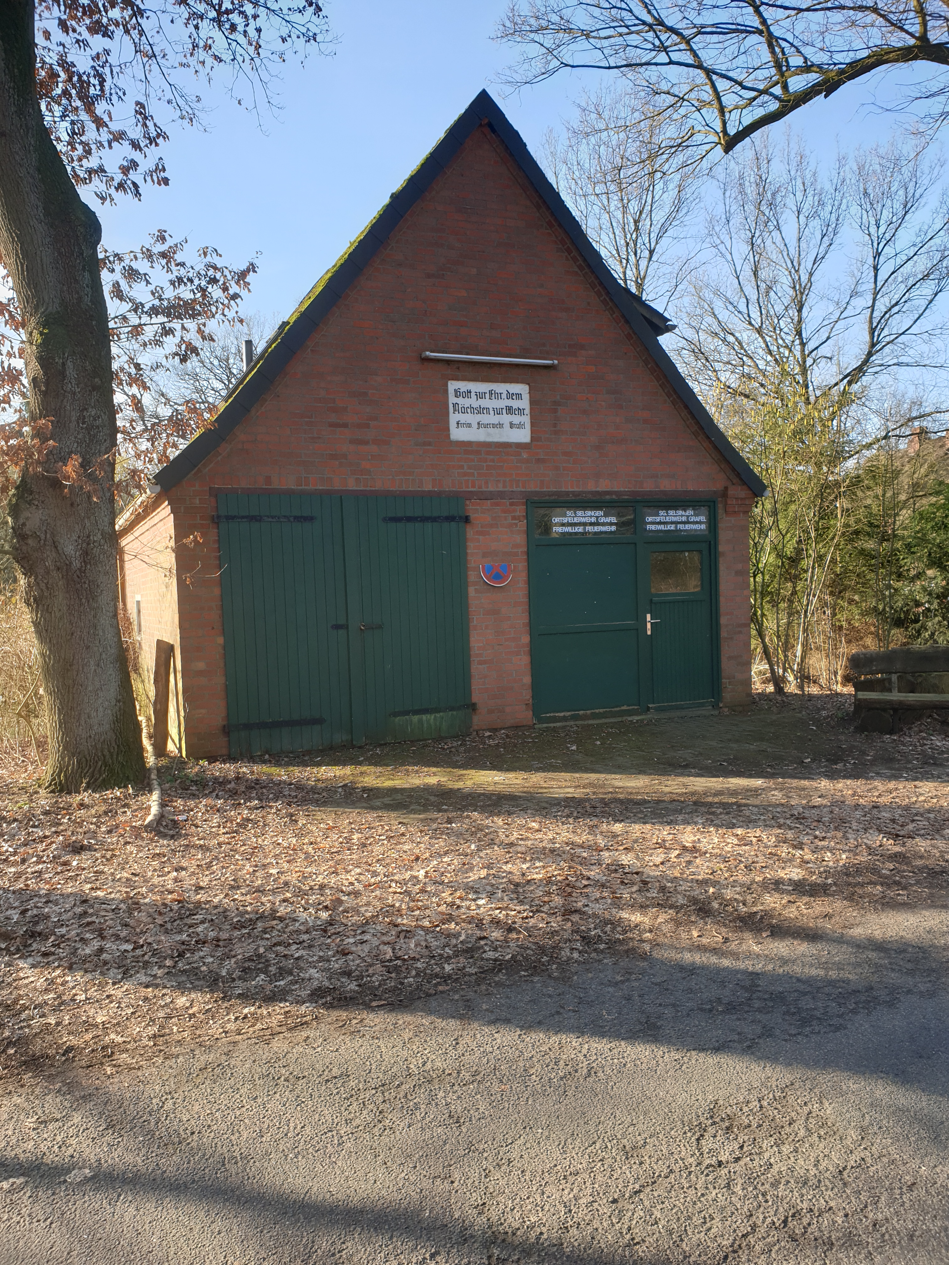 Leerstehendes Feuerwehrhaus in Grafel, Gemeinde Anderlingen (Landkreis Rotenburg/W.)